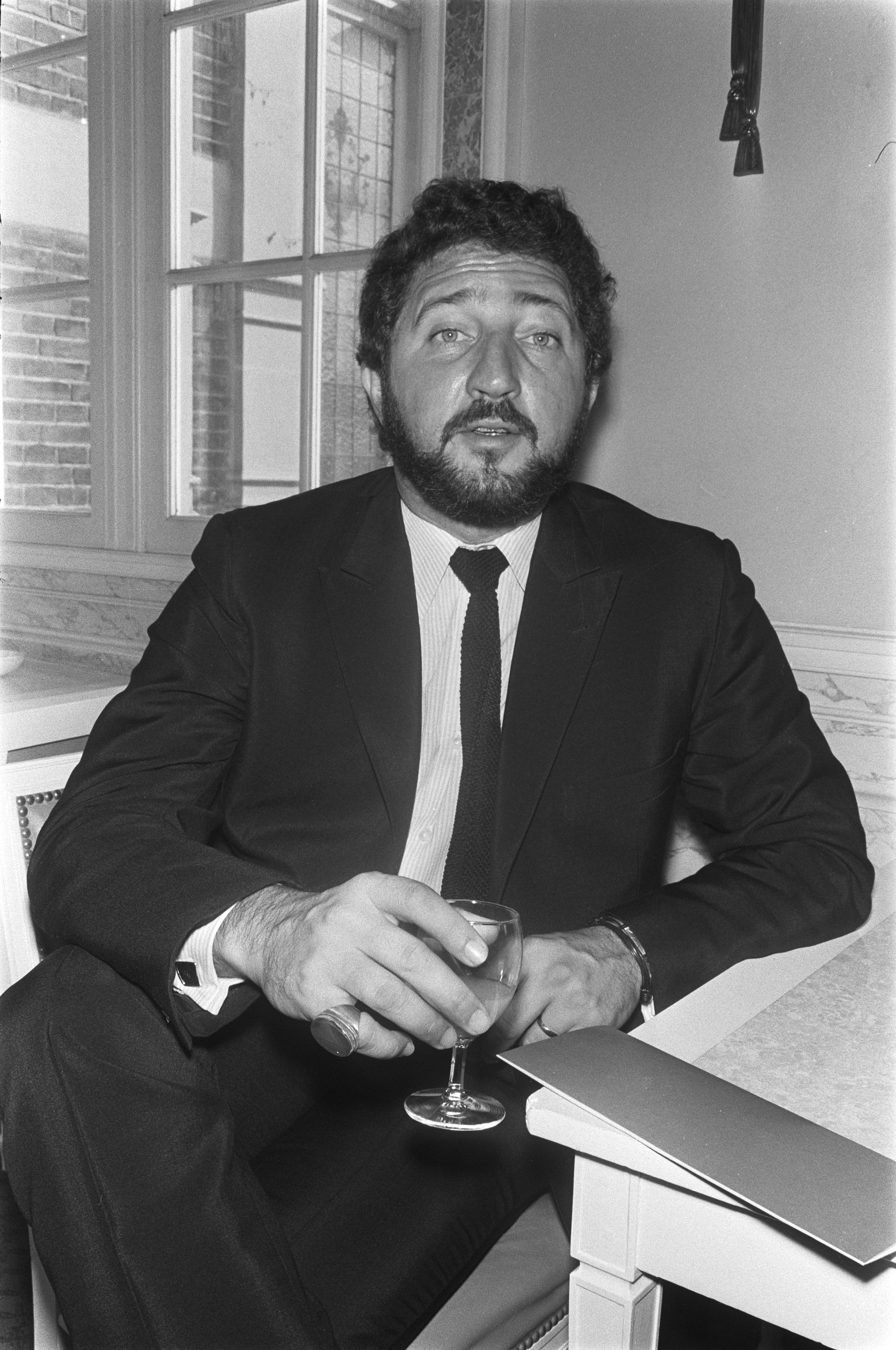 Collectie / Archief : Fotocollectie Anefo Reportage / Serie : [ onbekend ] Beschrijving : Edisons klassiek 1970 zijn uitgereikt in Concertgebouw, Amsterdam; Hans Boskamp Datum : 16 oktober 1970 Locatie : Amsterdam, Noord-Holland Persoonsnaam : Boskamp, Hans Fotograaf : Koch, Eric / Anefo, [onbekend] Auteursrechthebbende : Nationaal Archief Materiaalsoort : Negatief (zwart/wit) Nummer archiefinventaris : bekijk toegang 2.24.01.05 Bestanddeelnummer : 923-9296